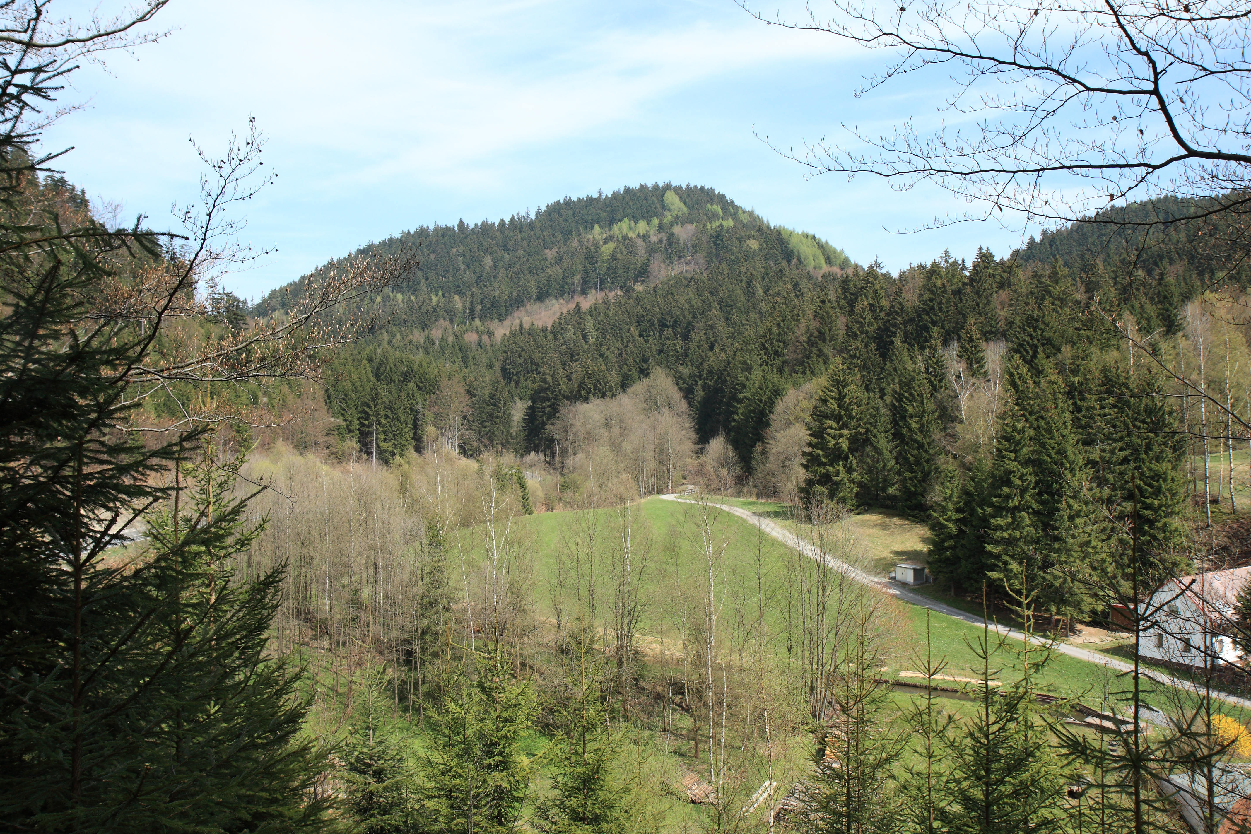 Ansicht des Schanzberges aus südwestlicher Richtung. Im Vordergrund der Zainhammer.